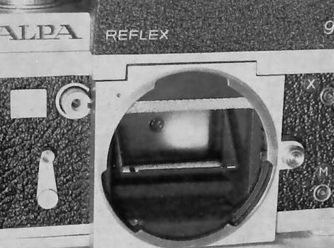 Baïonnette Alpa pour le montage des objectifs (1968)